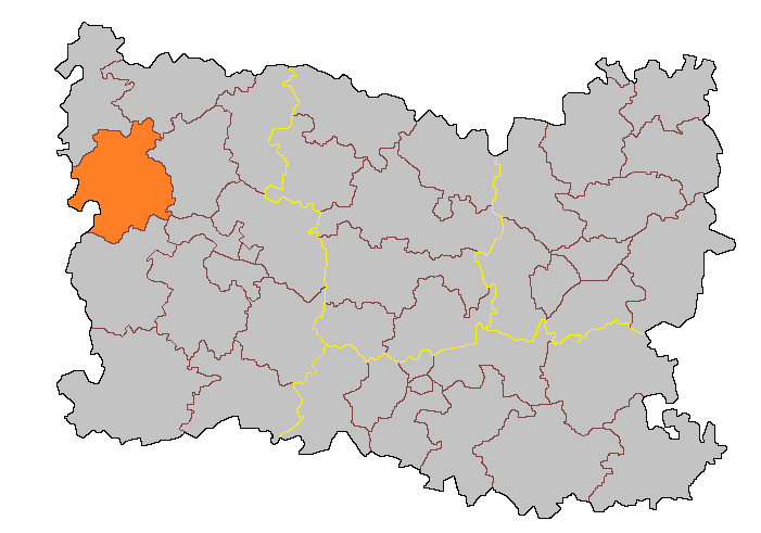 Кантон Сонжон на карте департамента Уаза